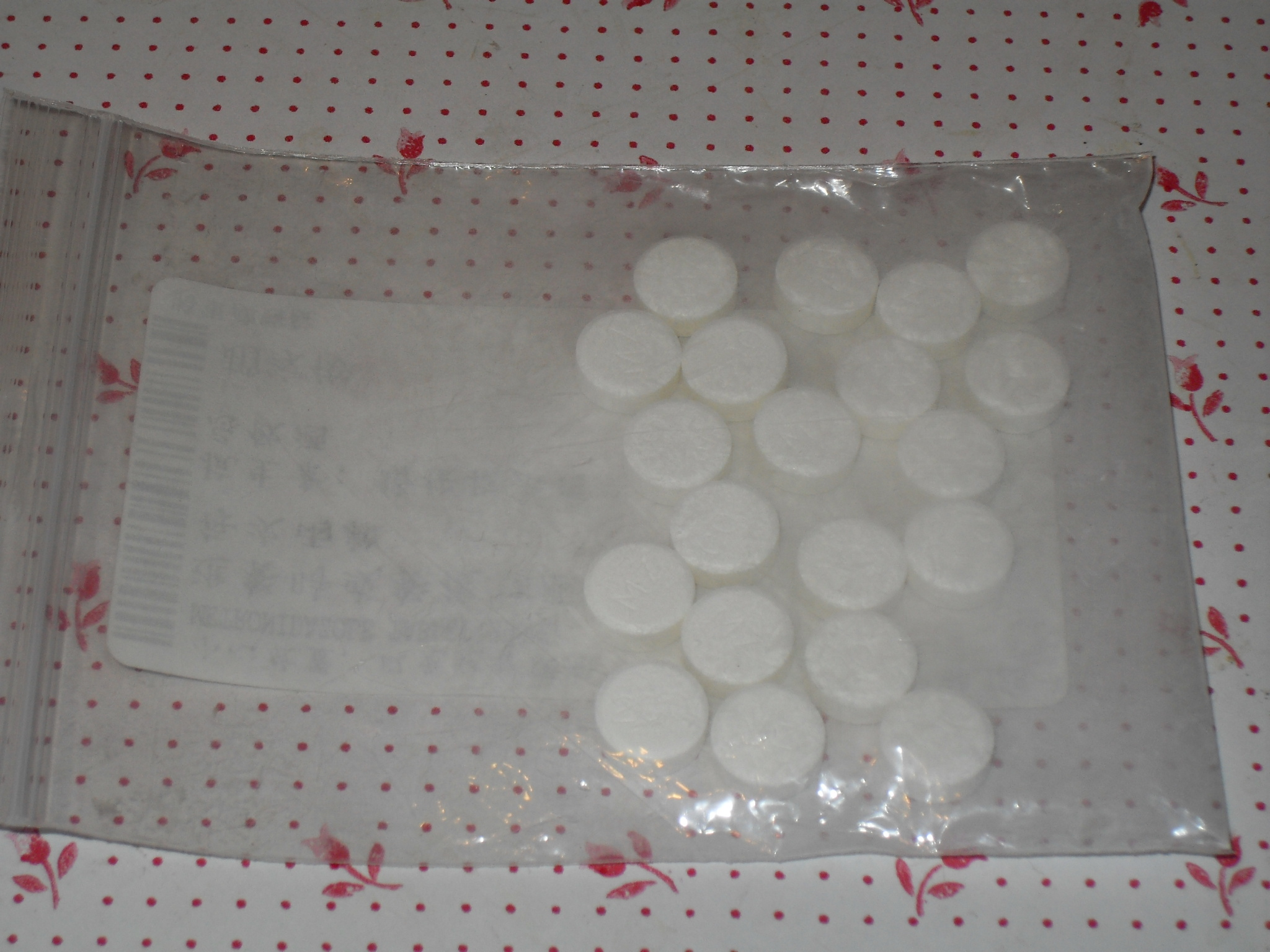 Metronidazole Tablets as presciped by Tseung Kwan O Hospital. 60 Tablets pack, shall be generic drugs. Nil alcohol. tds b/f or a/f meal.